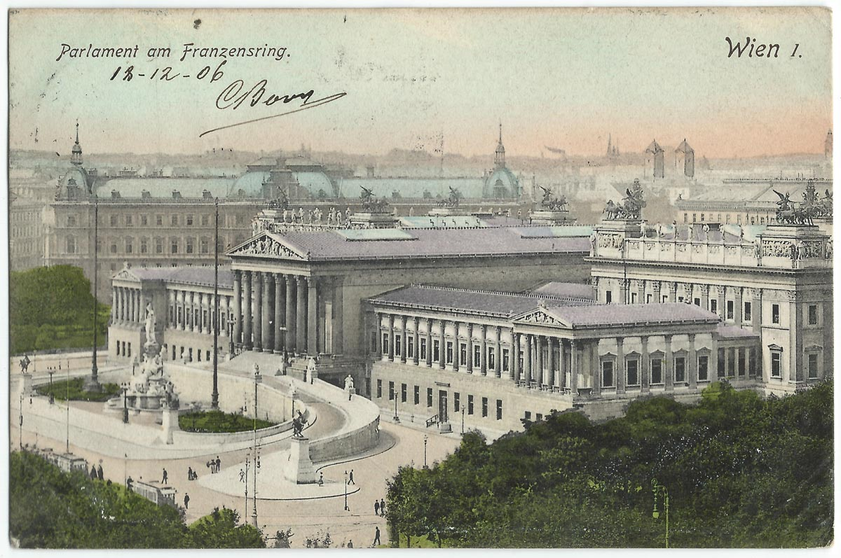 Vue de Vienne au début du XXe siècle.